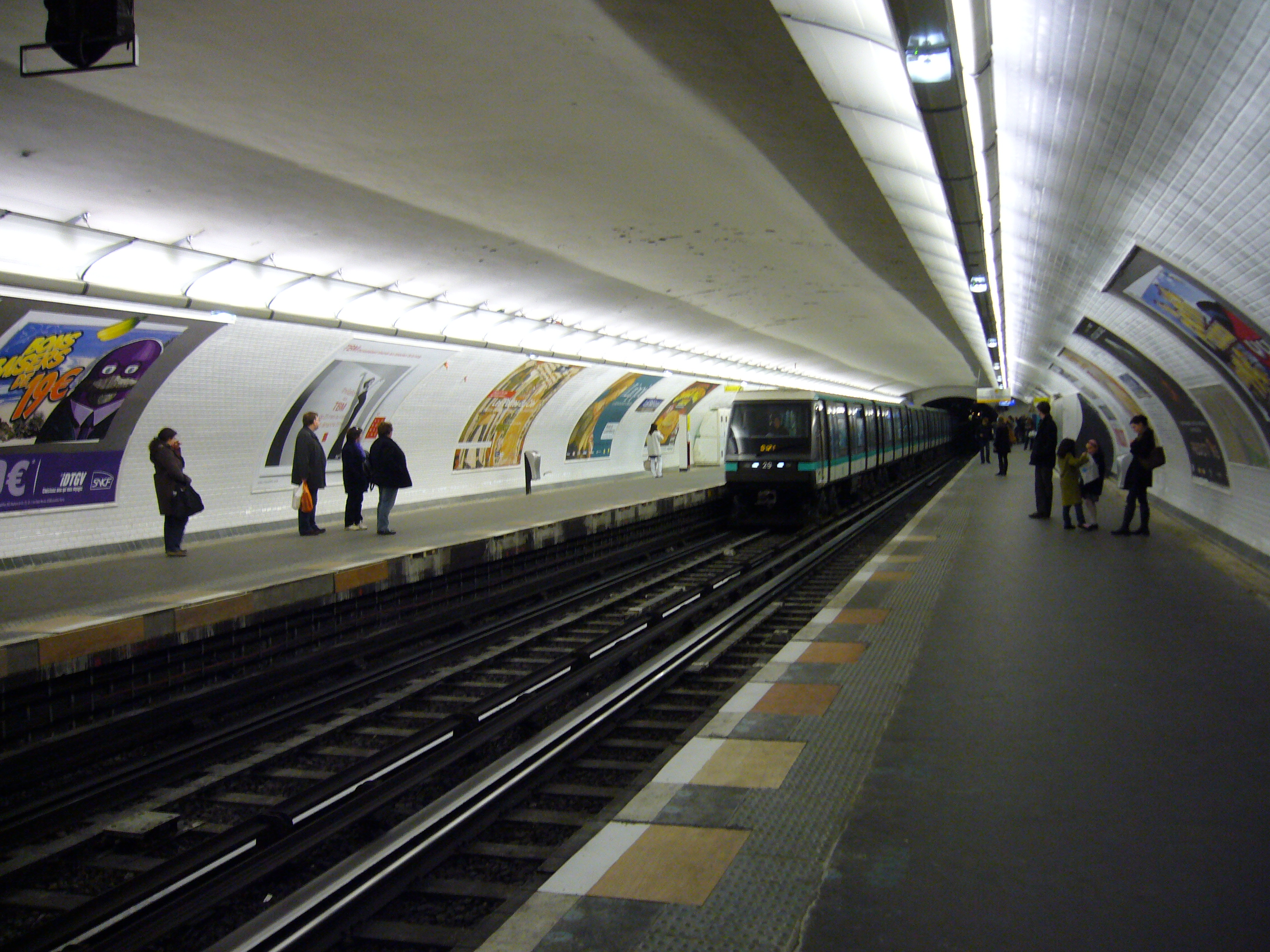 Les quais de la station Les Sablons sur la ligne 1 du métro de Paris.